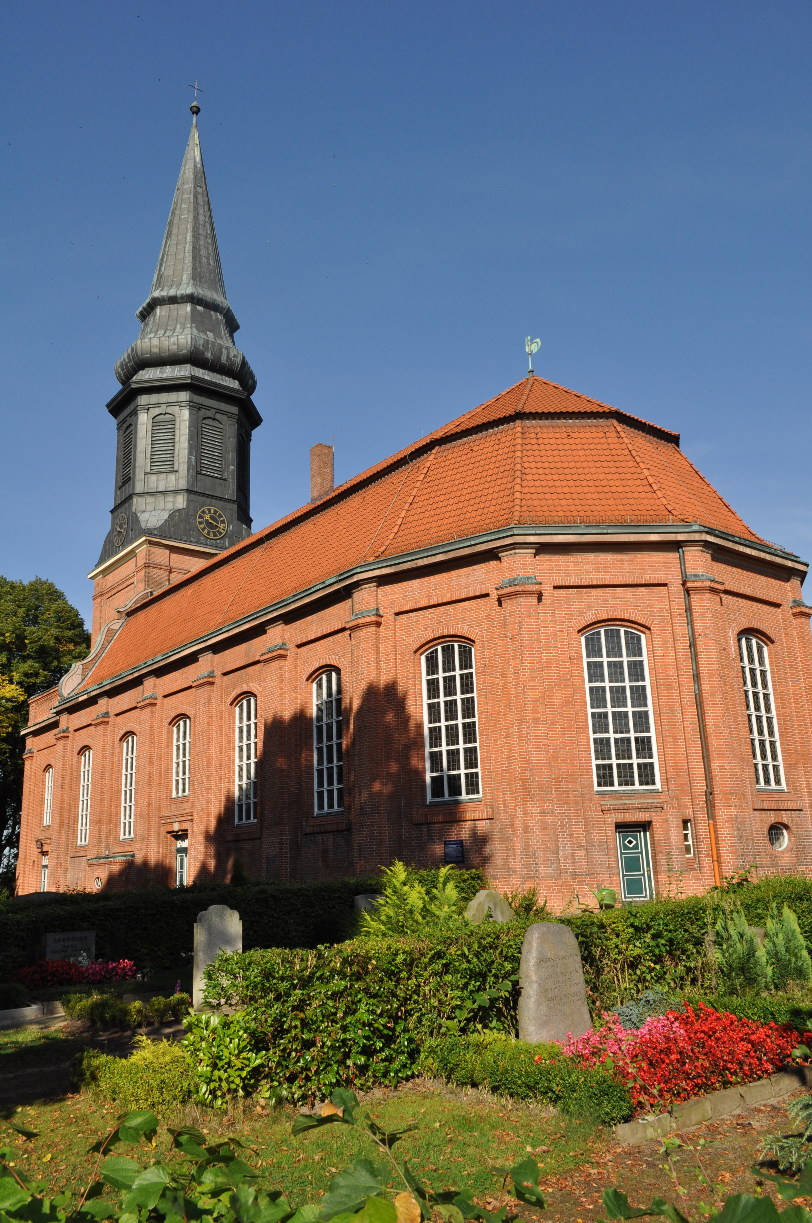 Kirche St. Nikolai in Hamburg-Billwerder. This is a photograph of an architectural monument.